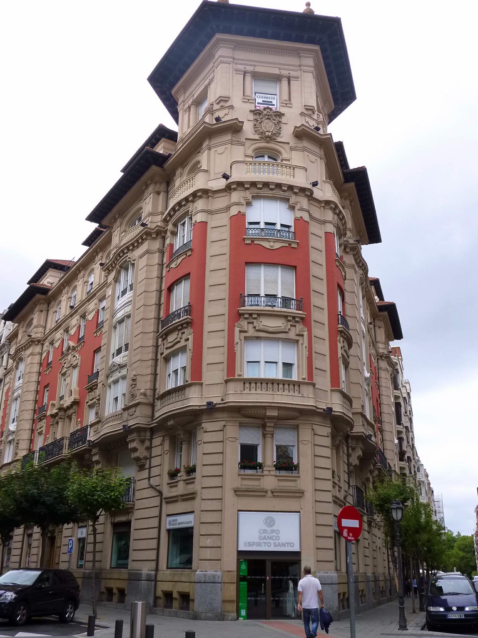 Calle Ercilla esquina calle Colón de Larreátegui (Bilbao)